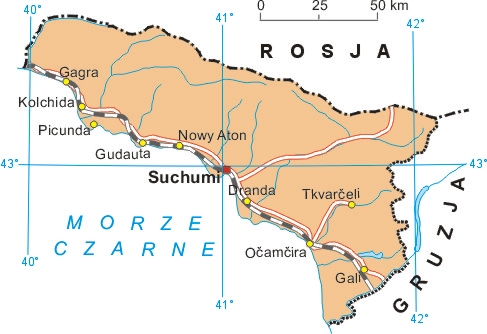 Mapa Abchazji. Autor: Aotearoa